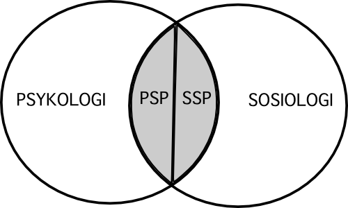 Fremstilling av sosialpsykologiens faglige plassering